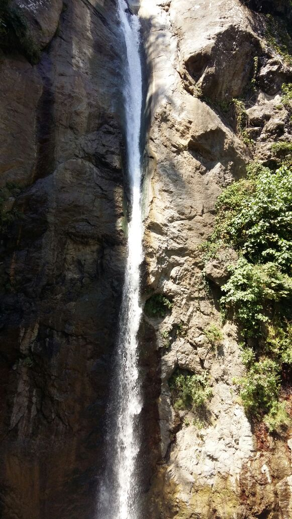 Qələbin kəndinin aşağı şəlaləsi